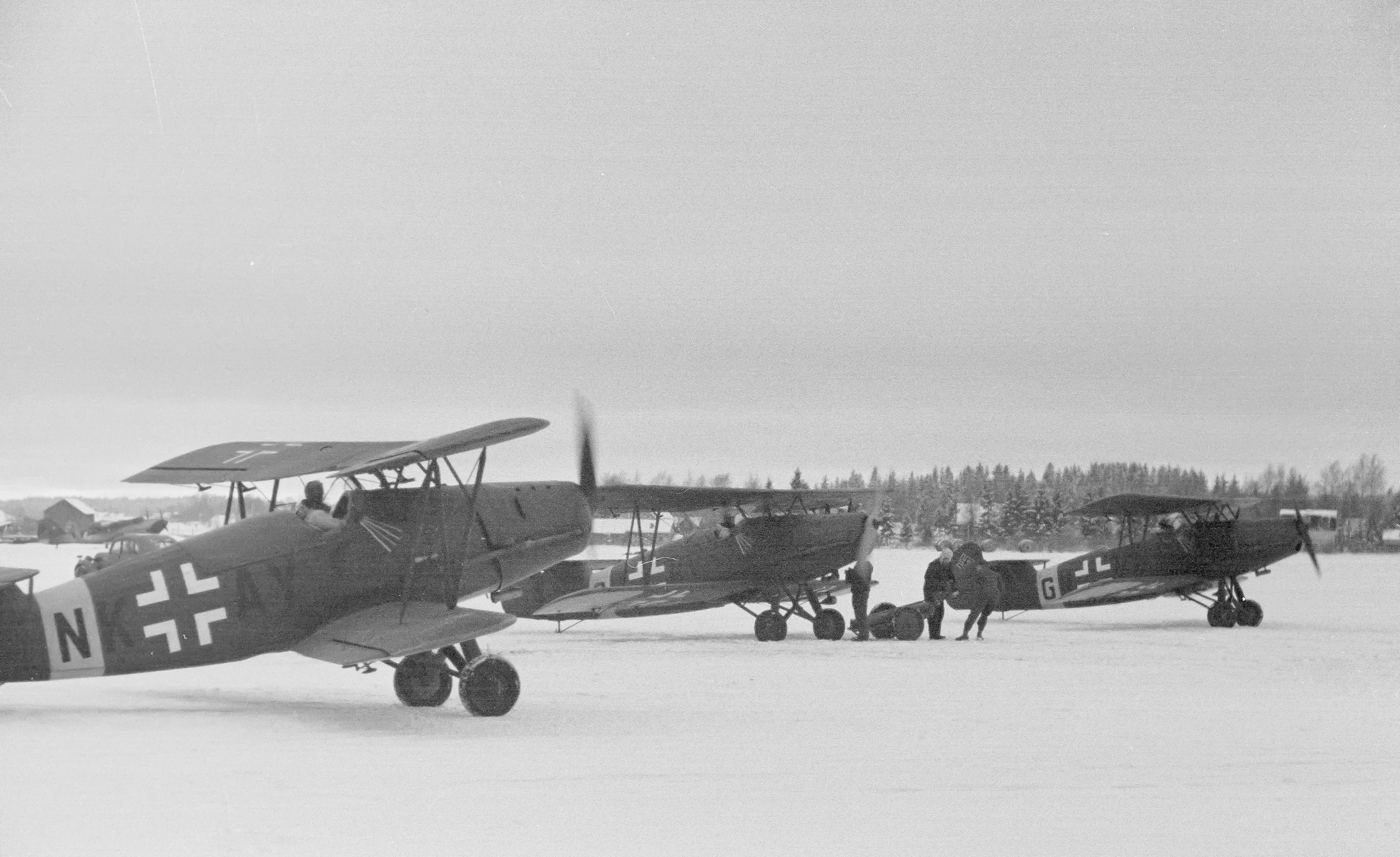 Arado-koneita kentällä. (Kuvassa Arado Ar 66 koulukoneita). Kuvauspaikka: Malmin lentokenttä.